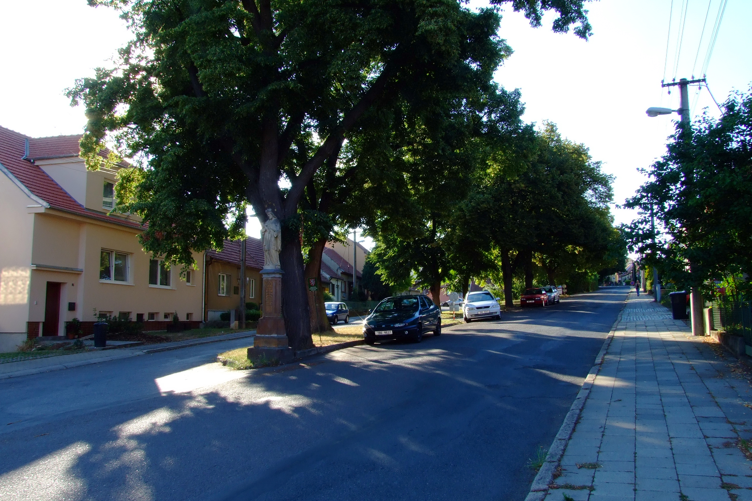 Brno-Bosonohy - Bosonožské náměstí